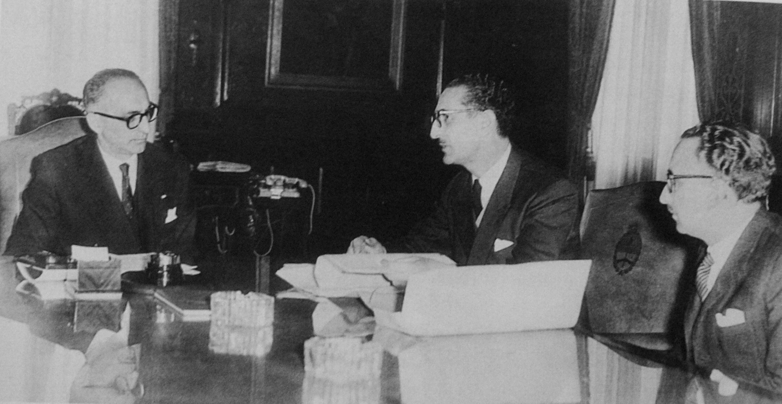 Es una foto del presidente Frondizi junto a su hermano Risieri, rector de la UBA, durante la época del "laica o libre".